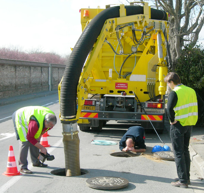 Utilisation d'une excavatrice-aspiratrice pour vider ou nettoyer égouts, canalisations ou regards